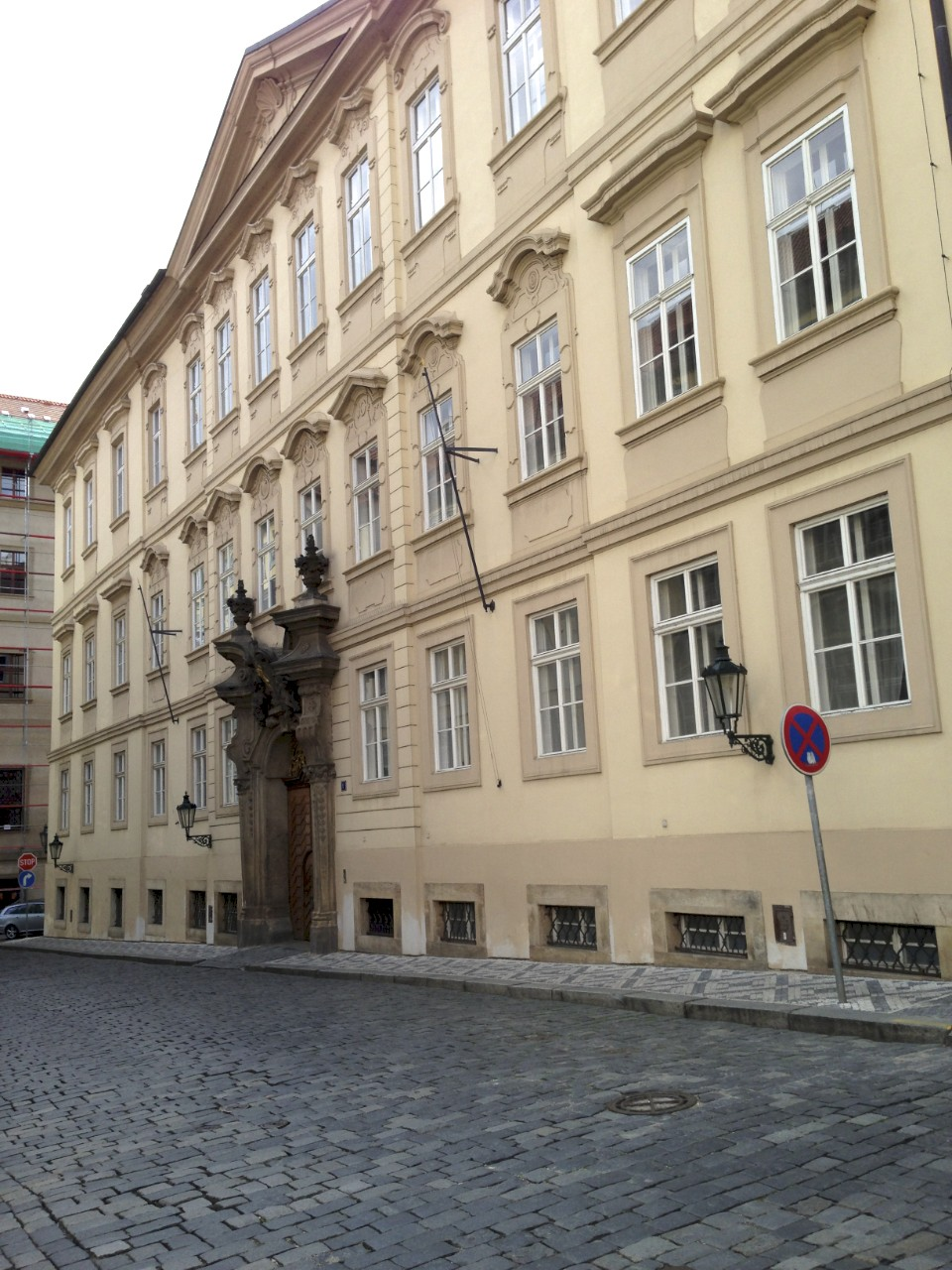 Bývalé jezuitské gymnázium na Malé Straně. Východní fasáda do Sněmovní ulice.